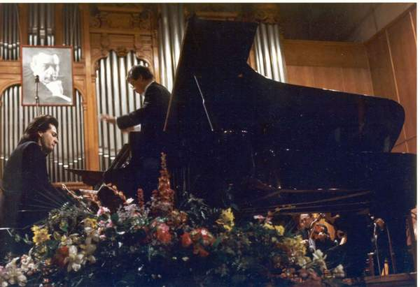 Пианист Карен Корниенко, обладатель Гран-при II международного конкурса им. Рахманинова.